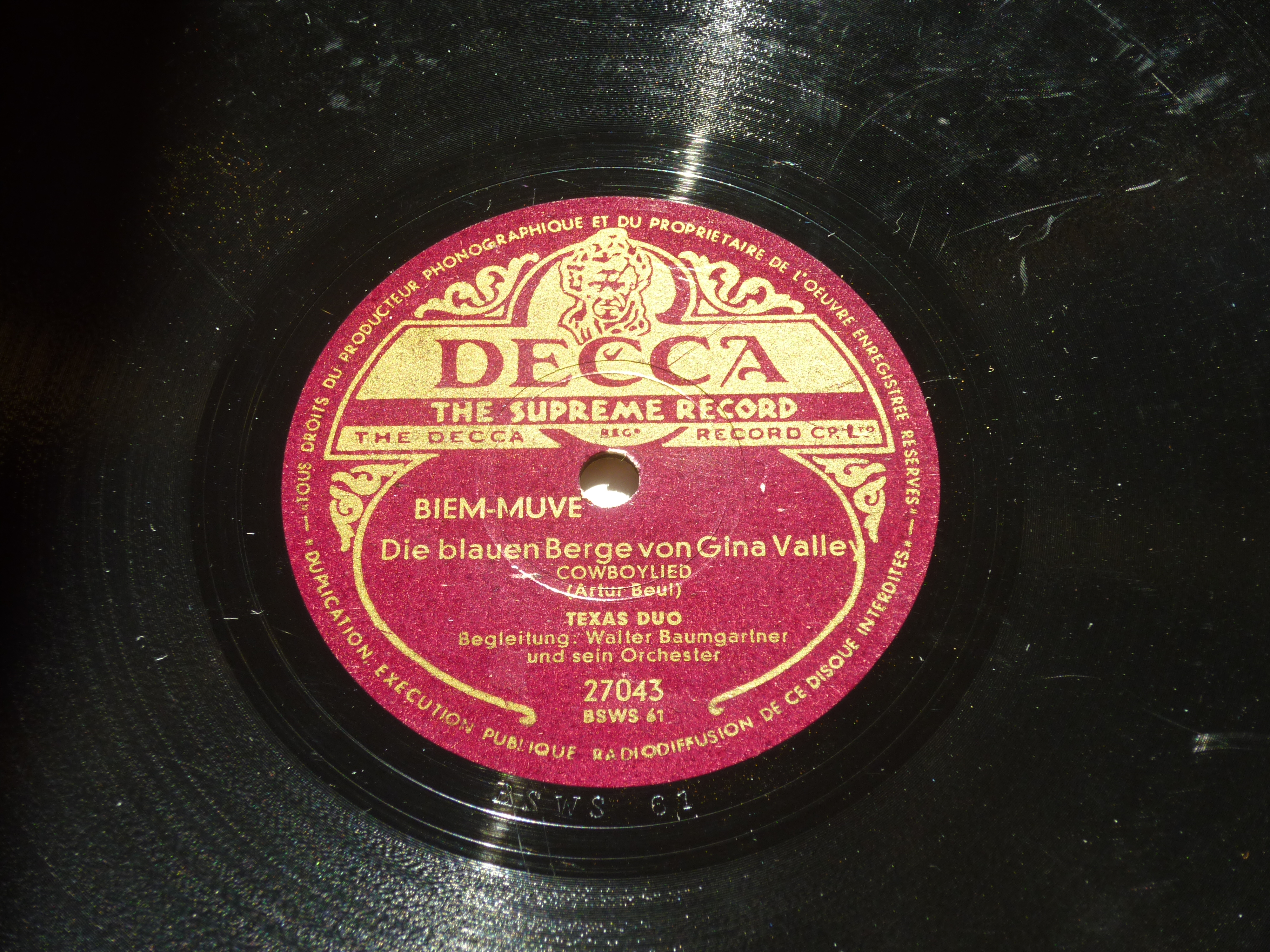 Aufnahme des Texas-Duo von Artur Beul, 1946